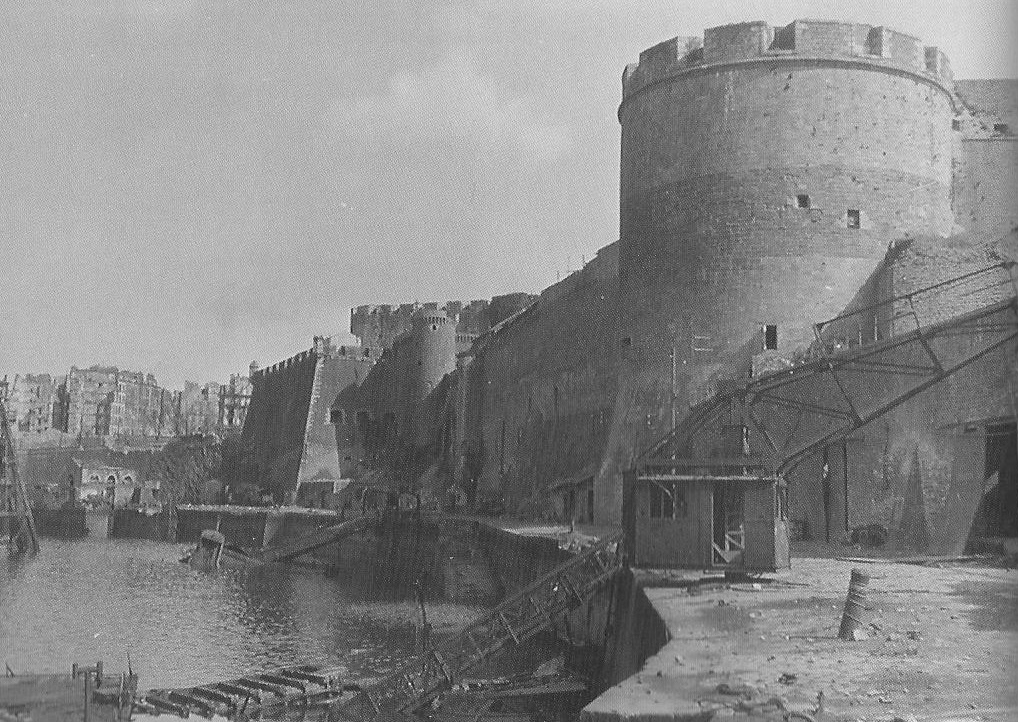 Destructions de Brest (photo US Navy 5 octobre 1944)